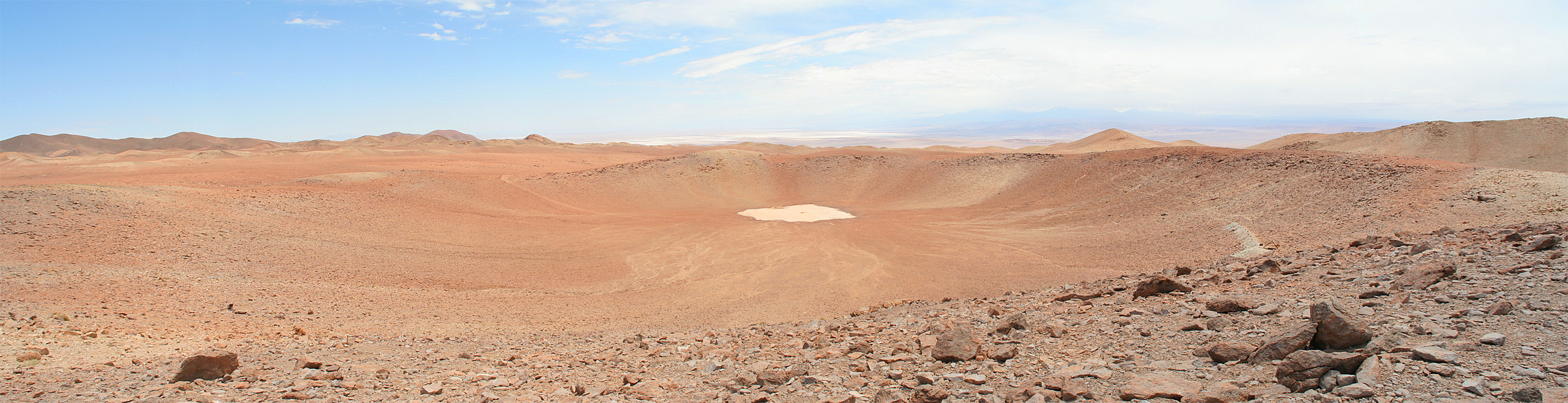 Meteoritenkrater Monturaqui, Chile